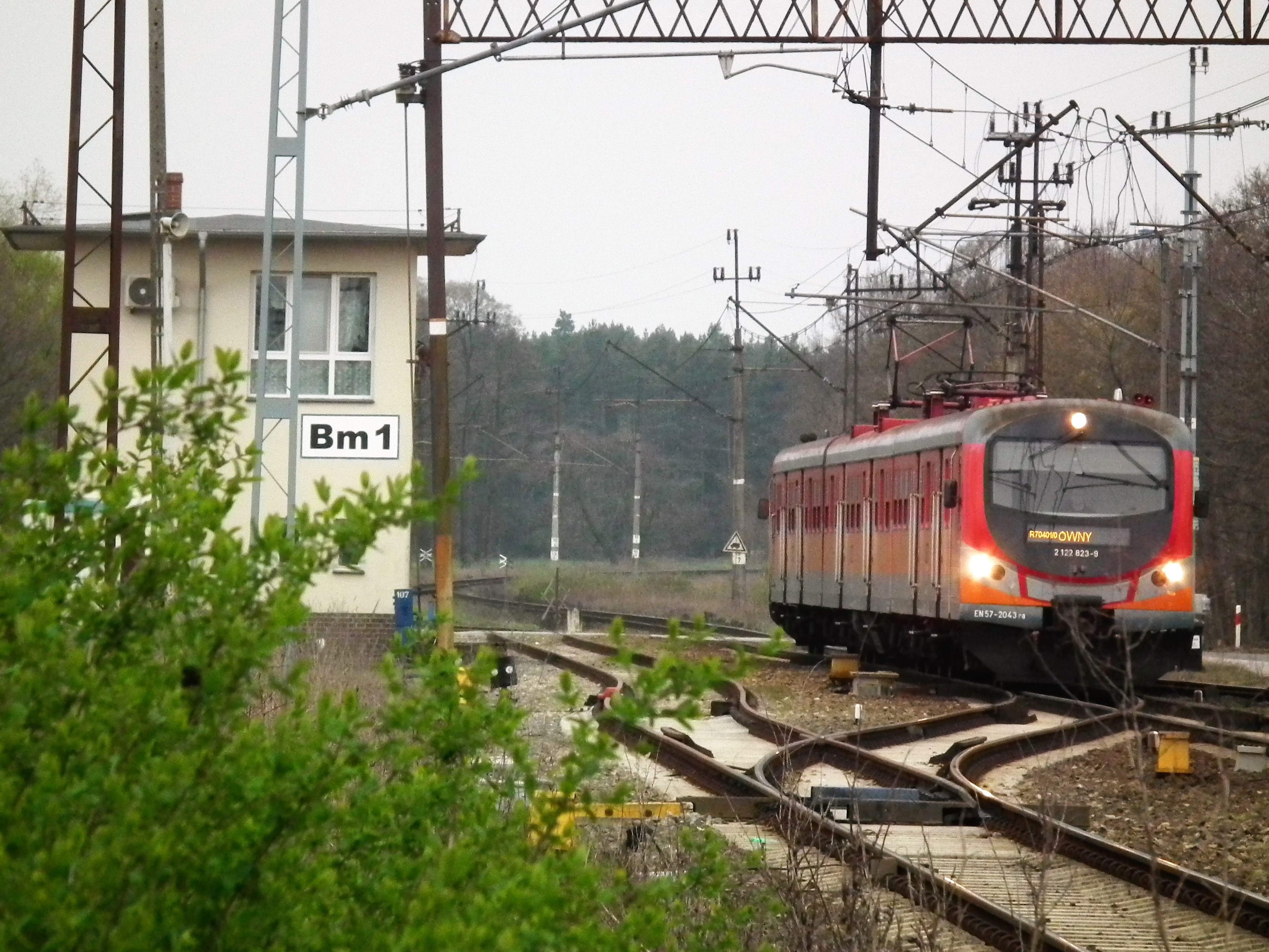 EN57-2043 z Zielonej Góry do Poznania w Babimoście.